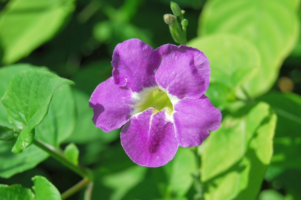 Verbena Jamaicensis (JAMAICA VERVAIN)